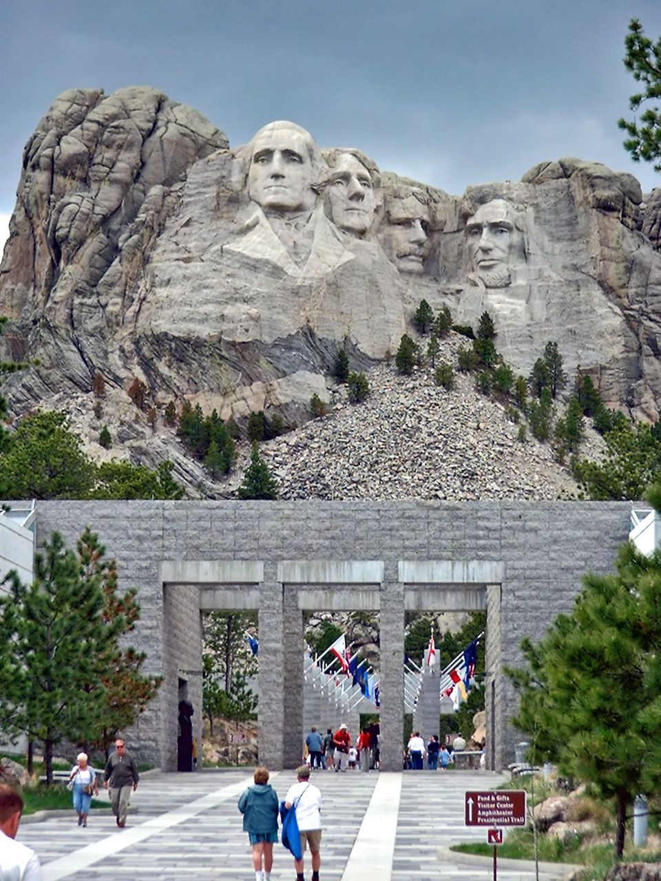 Mount Rushmore, South Dakota, United States. Photograph taken May 28, 2002 by Kelly Martin. چهار رئیس جمهور که تصاویر انها حک شده عبارتند از : جورج واشنگتن ، توماس جفرسون ، تئودور روزولت و ابراهام لینکلن